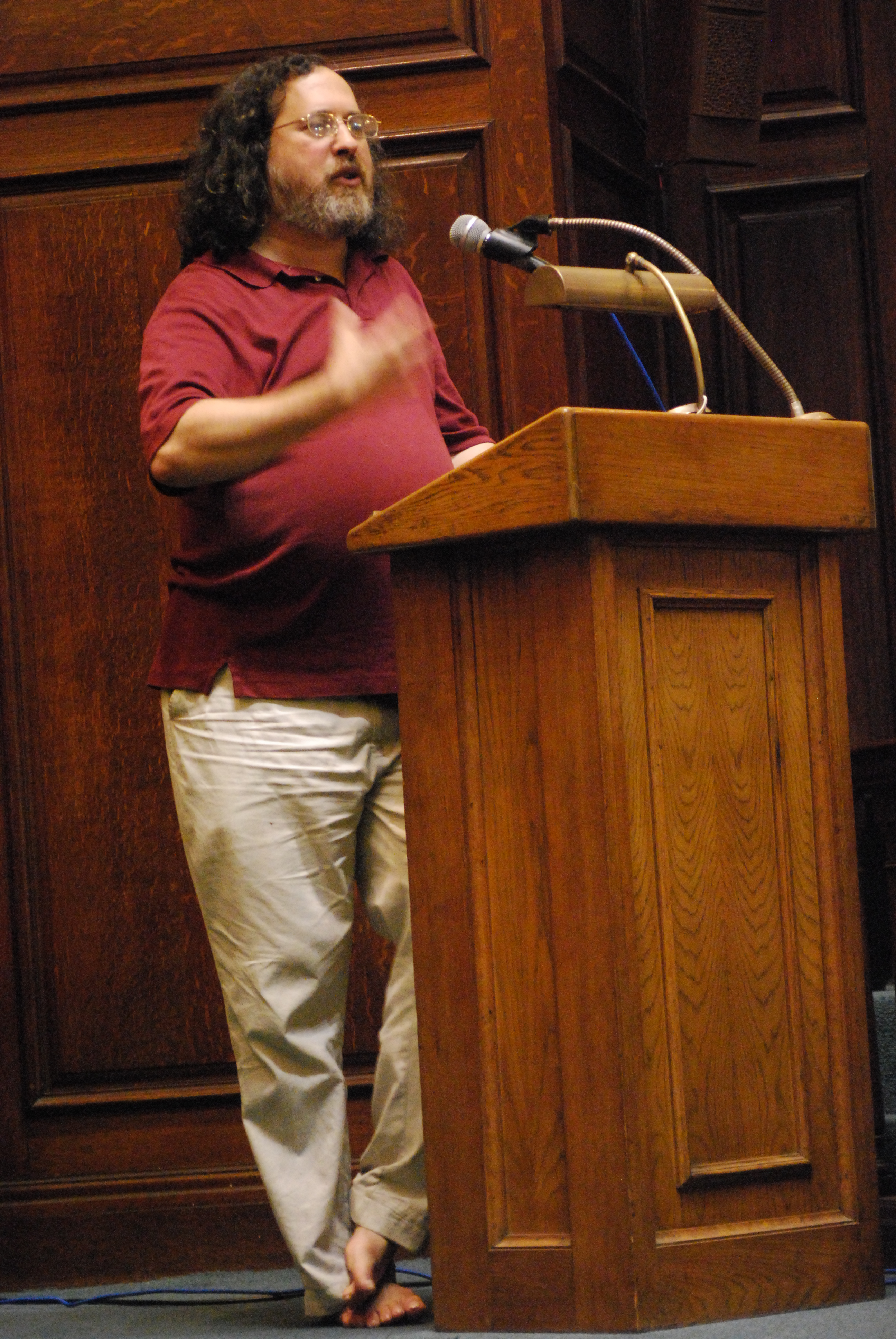 Richard Stallman dando una charla sobre software libre en el paraninfo de la UdelaR (Uruguay).